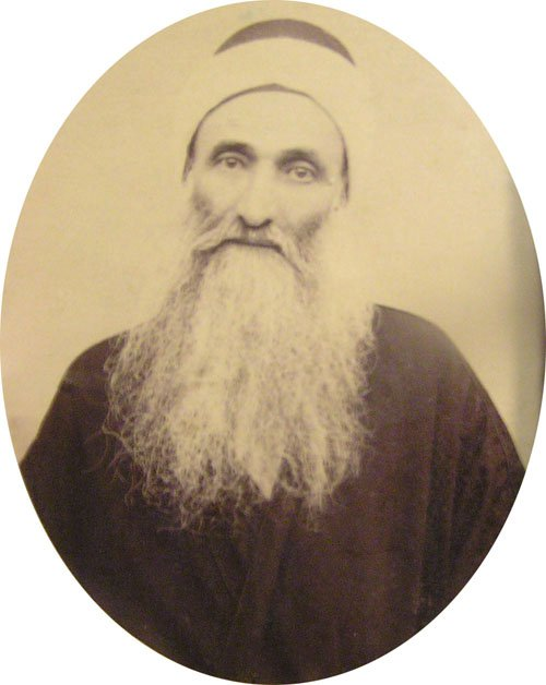 Photo par un photographe inconnu executée à Famagouste vers 1911.